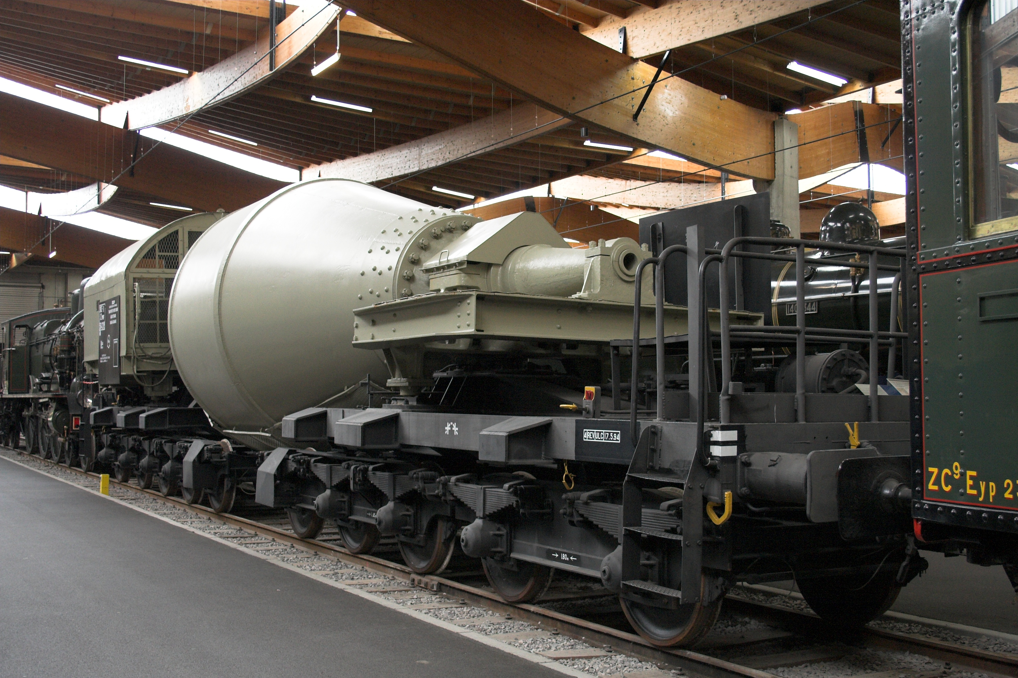 a wagon to transport molten iron at Cité du Train de Mulhouse(Mulhouse, France)